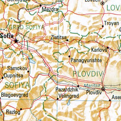 Panagjurischte - Lage der Stadt in Bulgarien